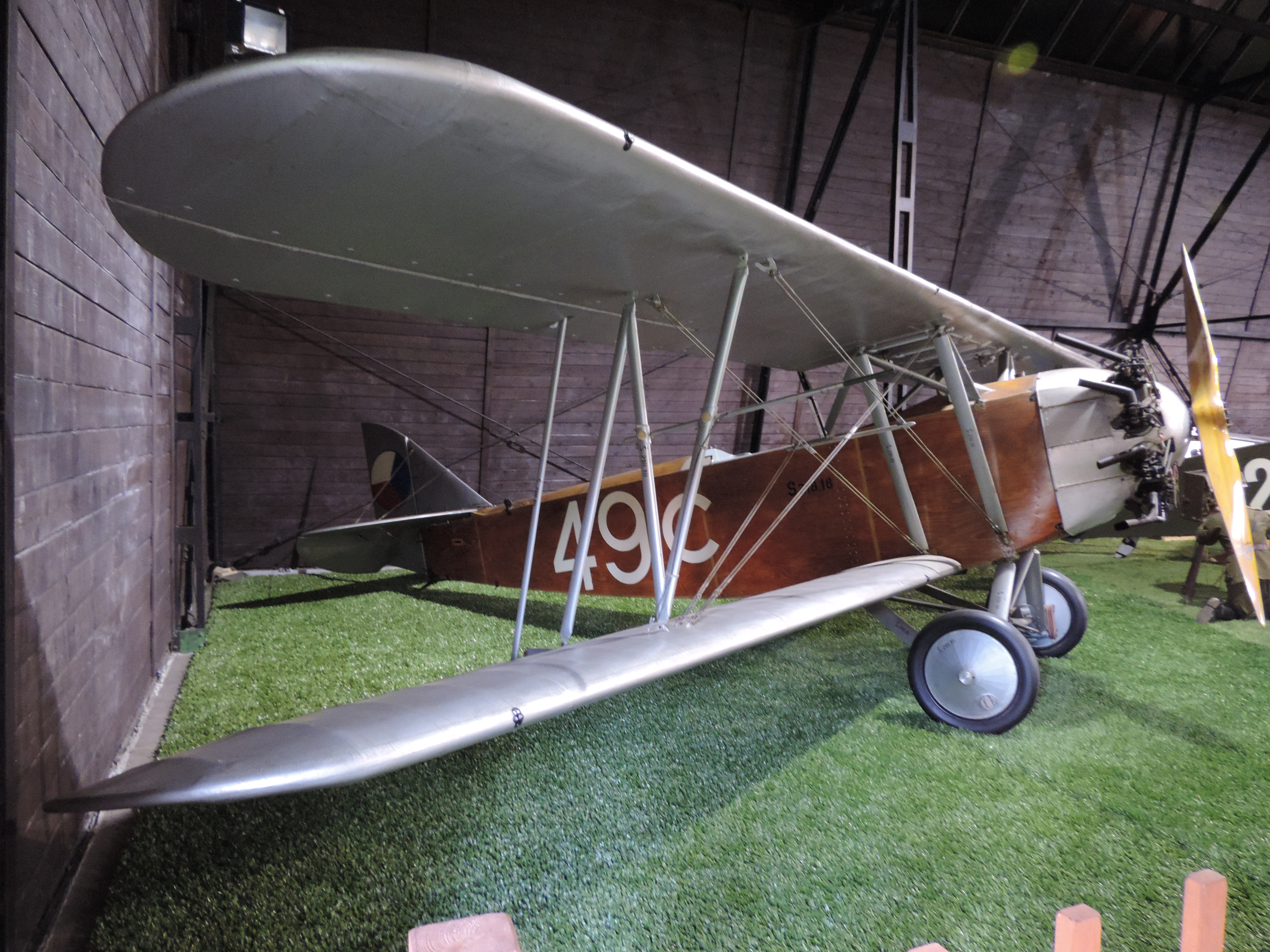 Letov Š-218 im Flugzeugmuseum Kbely